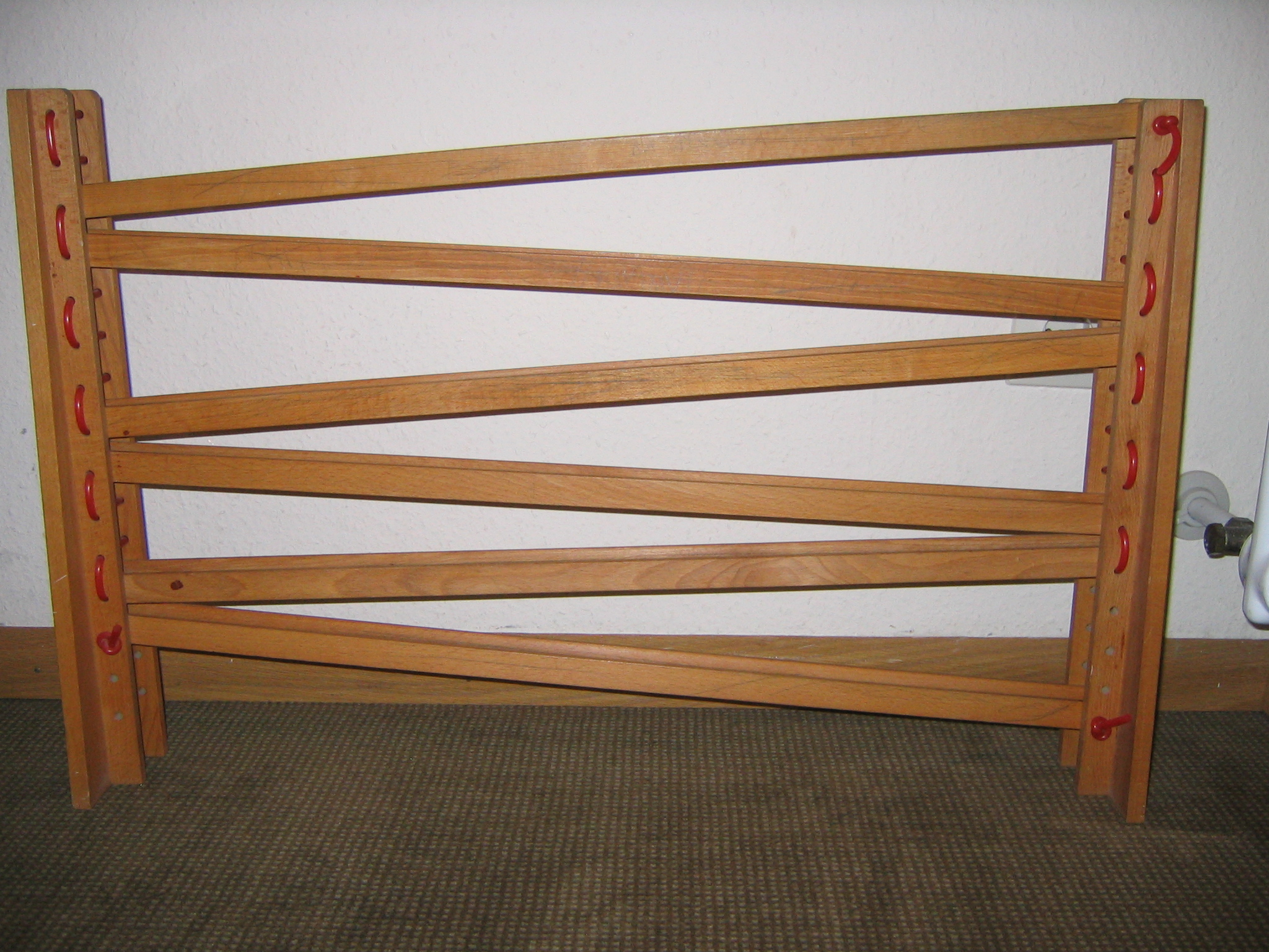 Eine Kugel-/Murmelbahn